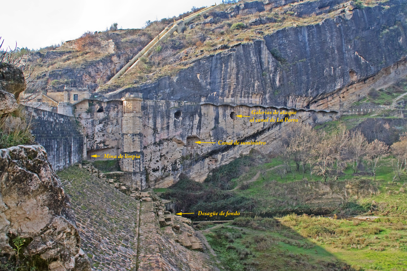 En la ladera derecha de la presa se abren paso las minas que dejan salir el agua de esta presa.